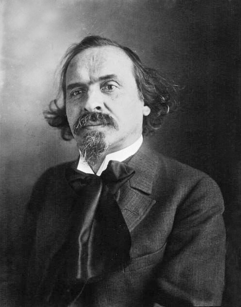 Seltz, député (Bas-Rhin) : photographie de presse